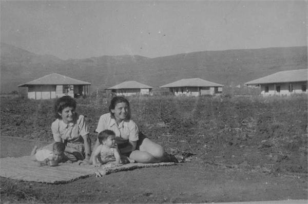 אמהות וילדיהן בשדה-נחמיה